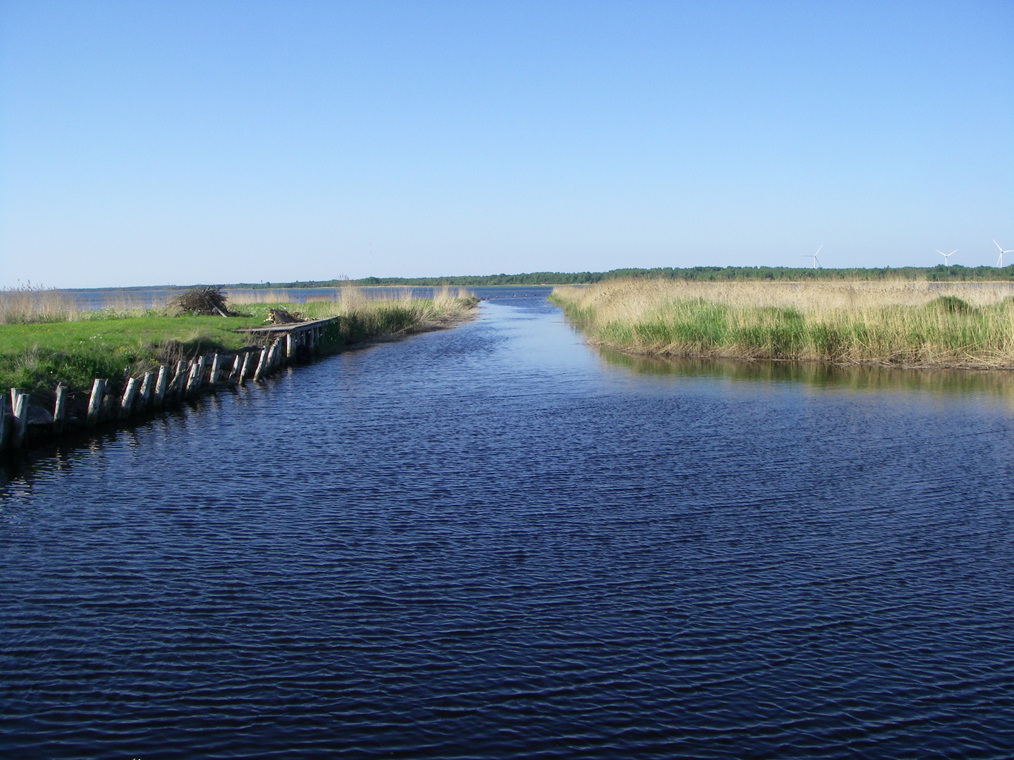 Hara sadam